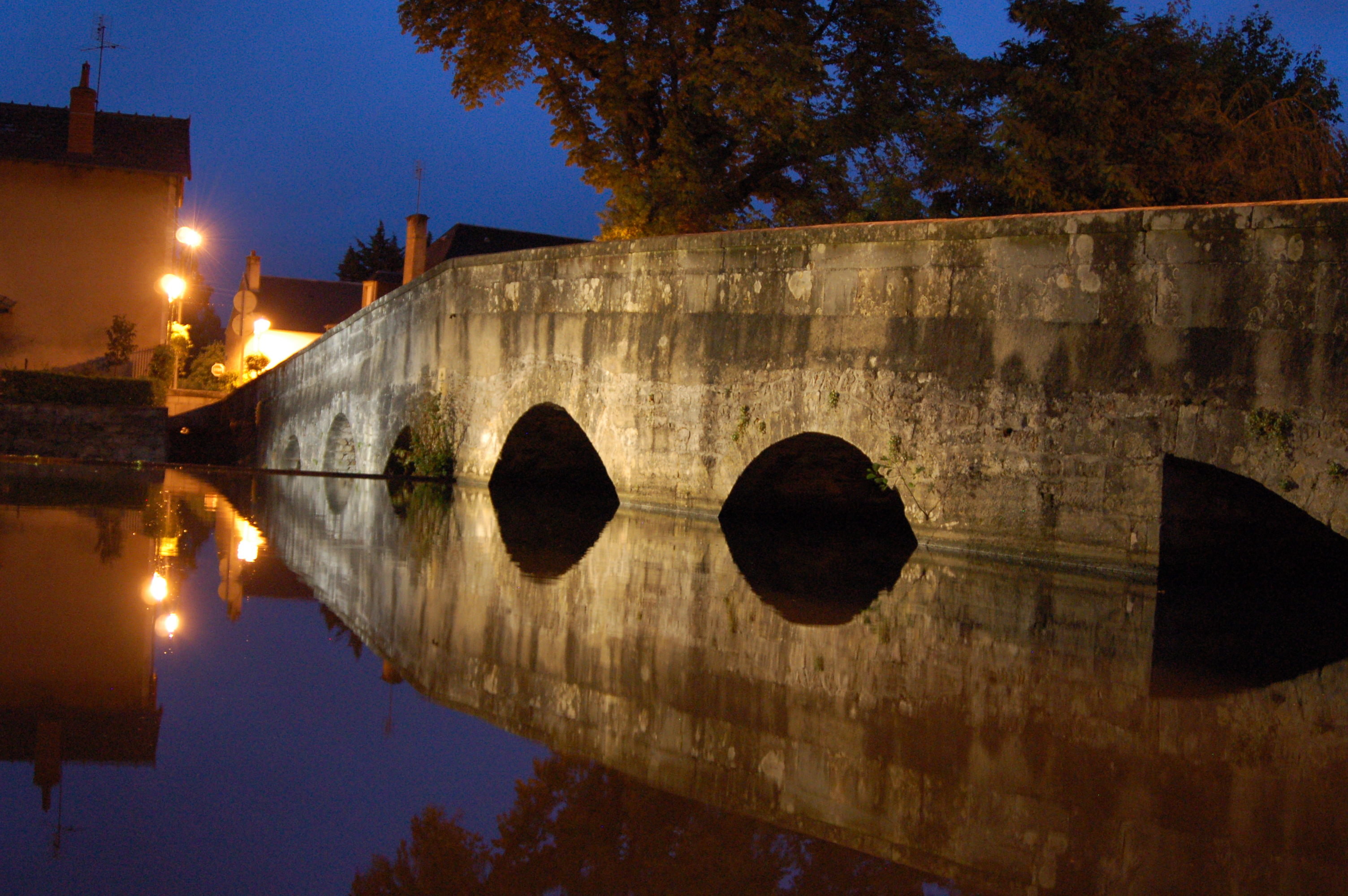 Pont du Xve siècle enjambant la Marmande.